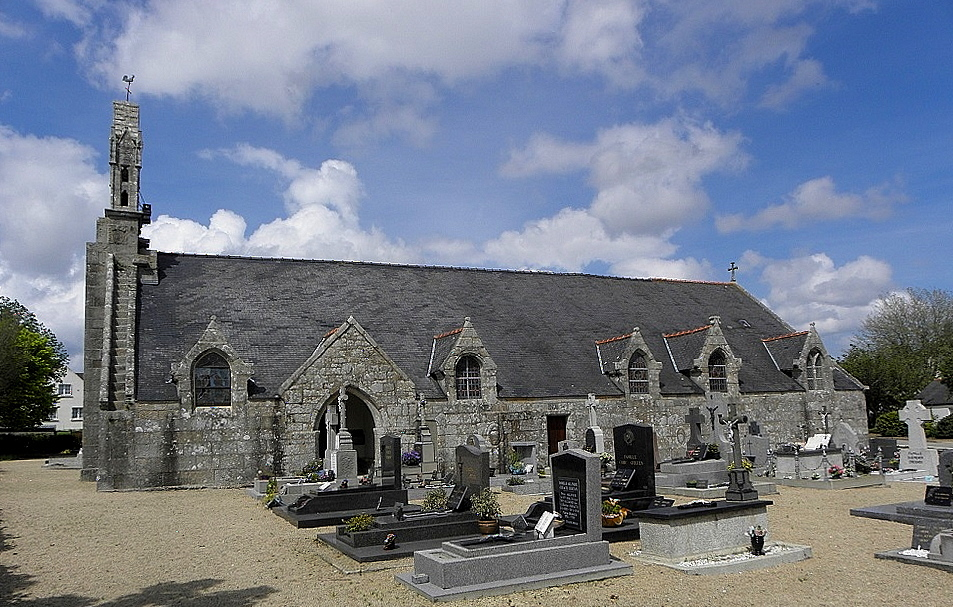 Église Saint-Léonor de Tréflaouénan (29). Flanc sud.